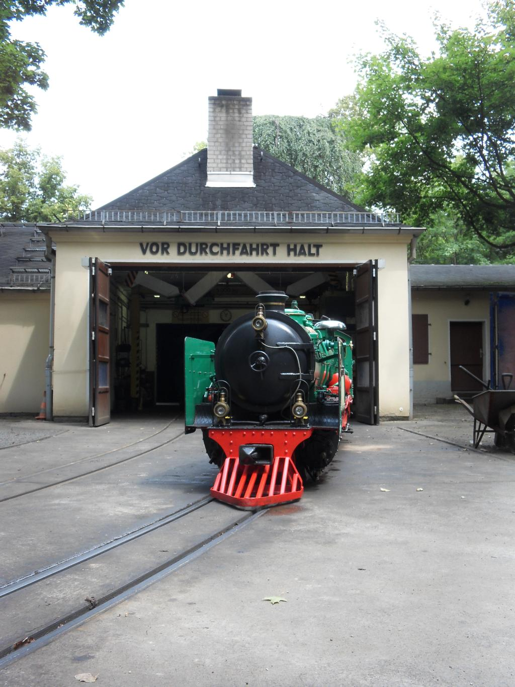 001-Lisa der Dresdner Parkeisenbahn vor dem Lokschuppen am Bahnhof Zoo